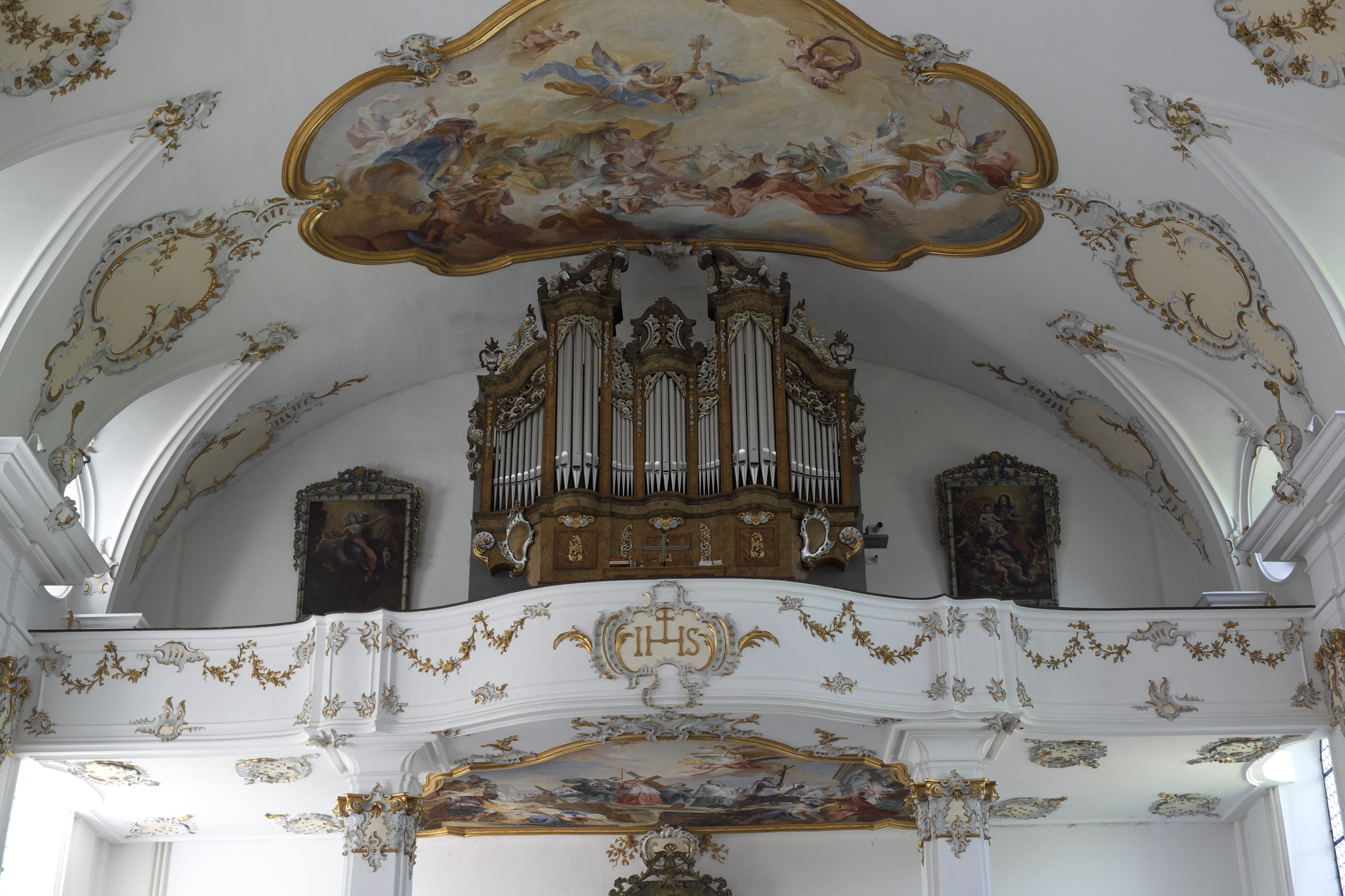 Wallfahrtskirche Heilig Kreuz, ehemalige Klosterkirche des Klosters Bergen in Bergen, einem Ortsteil von Neuburg an der Donau im Landkreis Neuburg-Schrobenhausen (Bayern), Westempore mit Orgel, Orgelprospekt von 1767, Deckenfresko von Johann Wolfgang Baumgartner, von 1758; Darstellung: Engelskonzert und Kreuzpartikelmonstranz